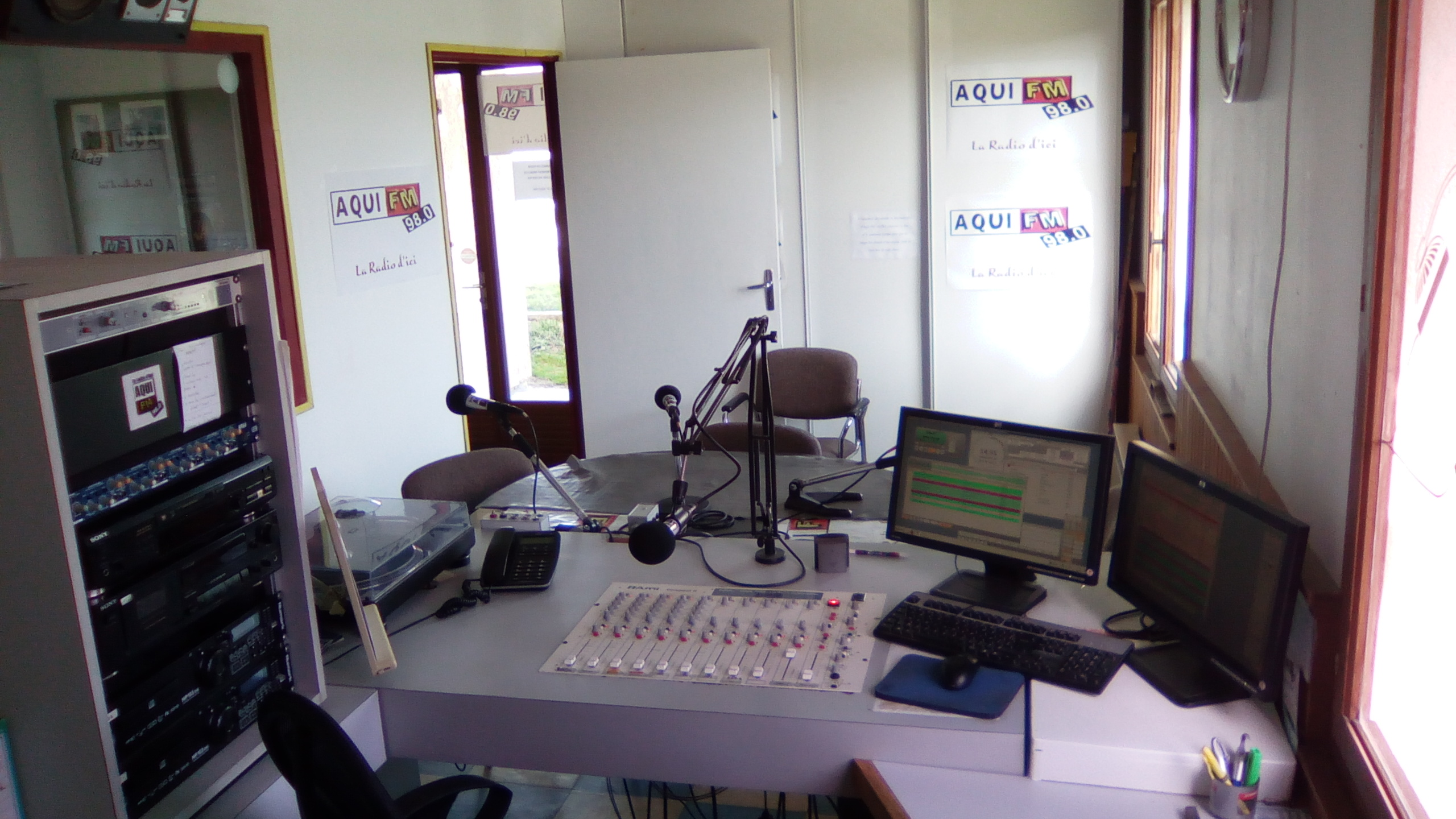 Vue de l'antenne (studio direct) de AquiFM à Saint-Germain d'Esteuil.